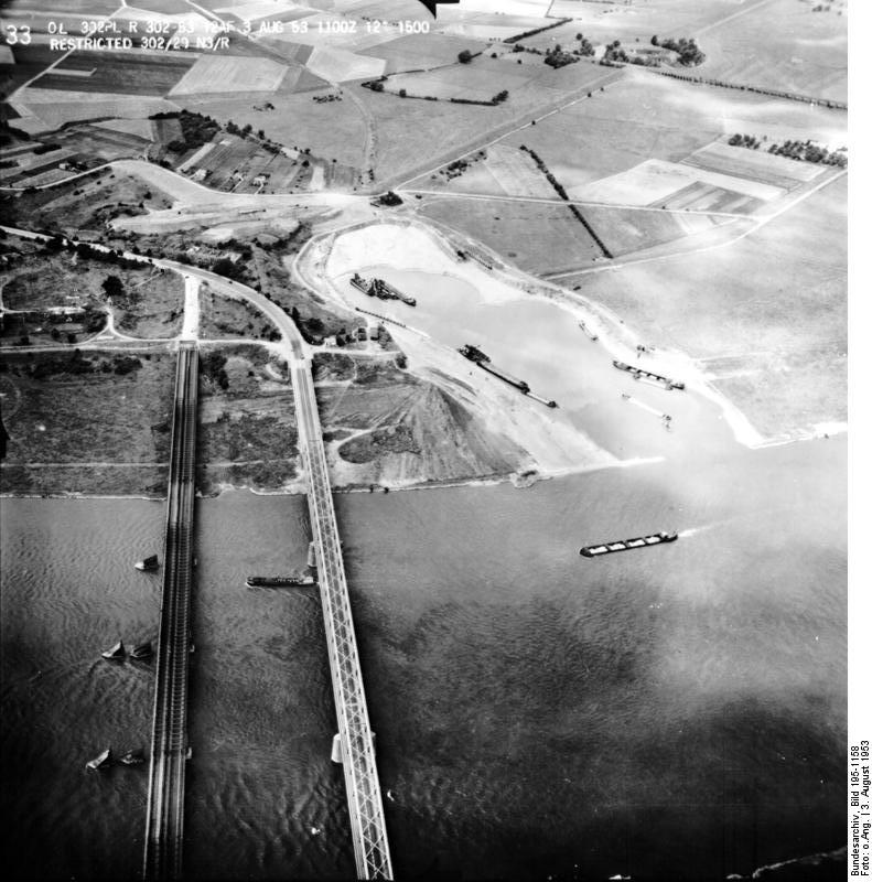 Rheinbefliegung der Alliierten 1953